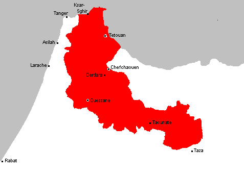 Espace linguistique du Jebli au nord du Maroc, selon: A. Zouggari & J. Vignet-Zunz,Jbala: Histoire et société, dans Sciences Humaines, (1991), p.463. (ISBN 2-222-04574-6).